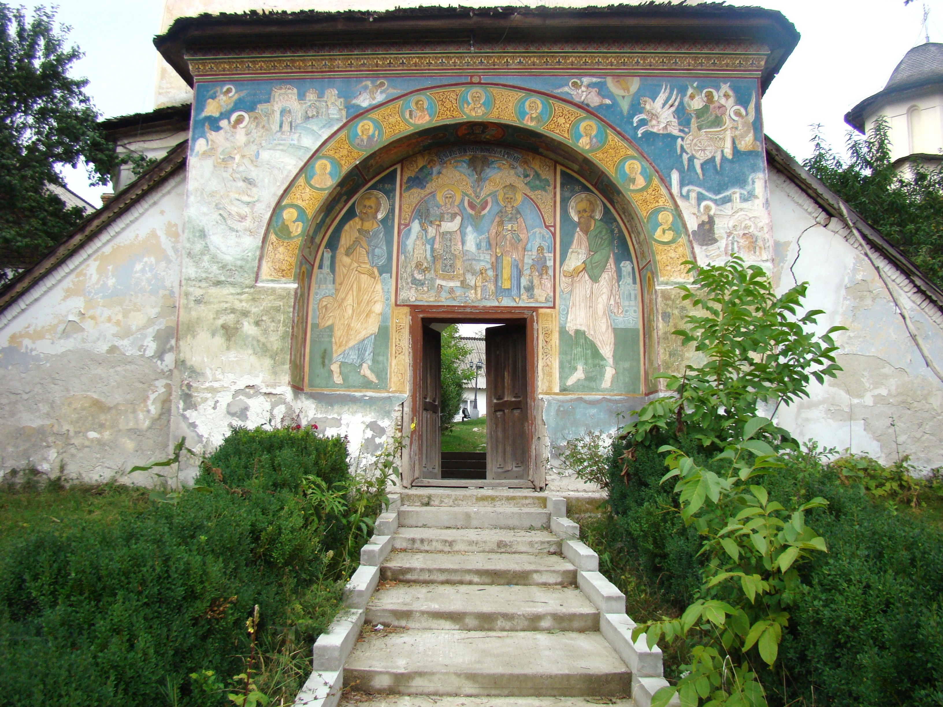 Ansamblul bisericii cu hramurile "Sf. Filofteia" și Sf. Nicolae", sat Valea Danului; comuna Valea Danului, județul Argeș